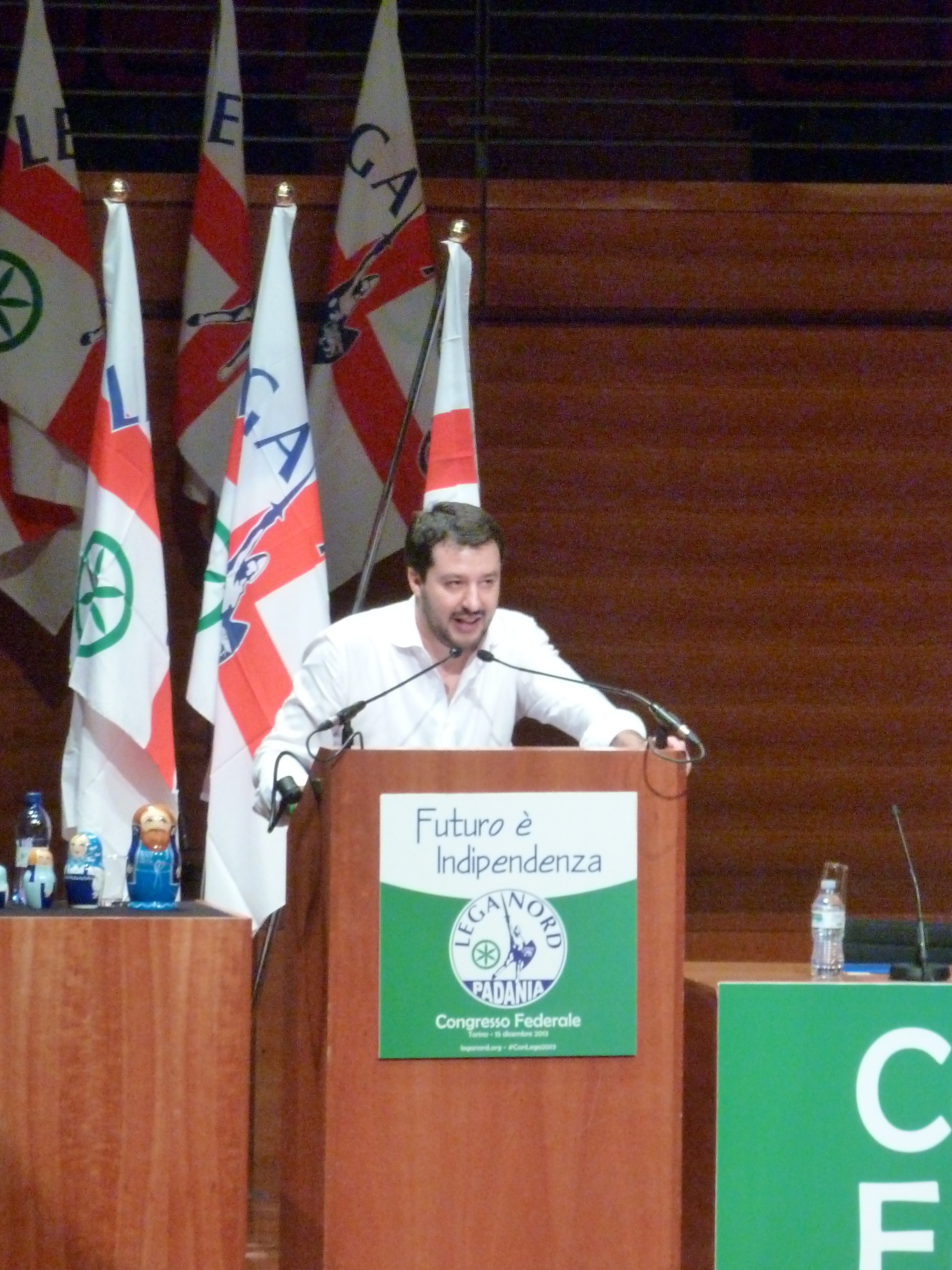 Congresso federale straordinario - Torino, 15 dicembre 2013. Discorso del candidato alla segreteria federale Matteo Salvini.